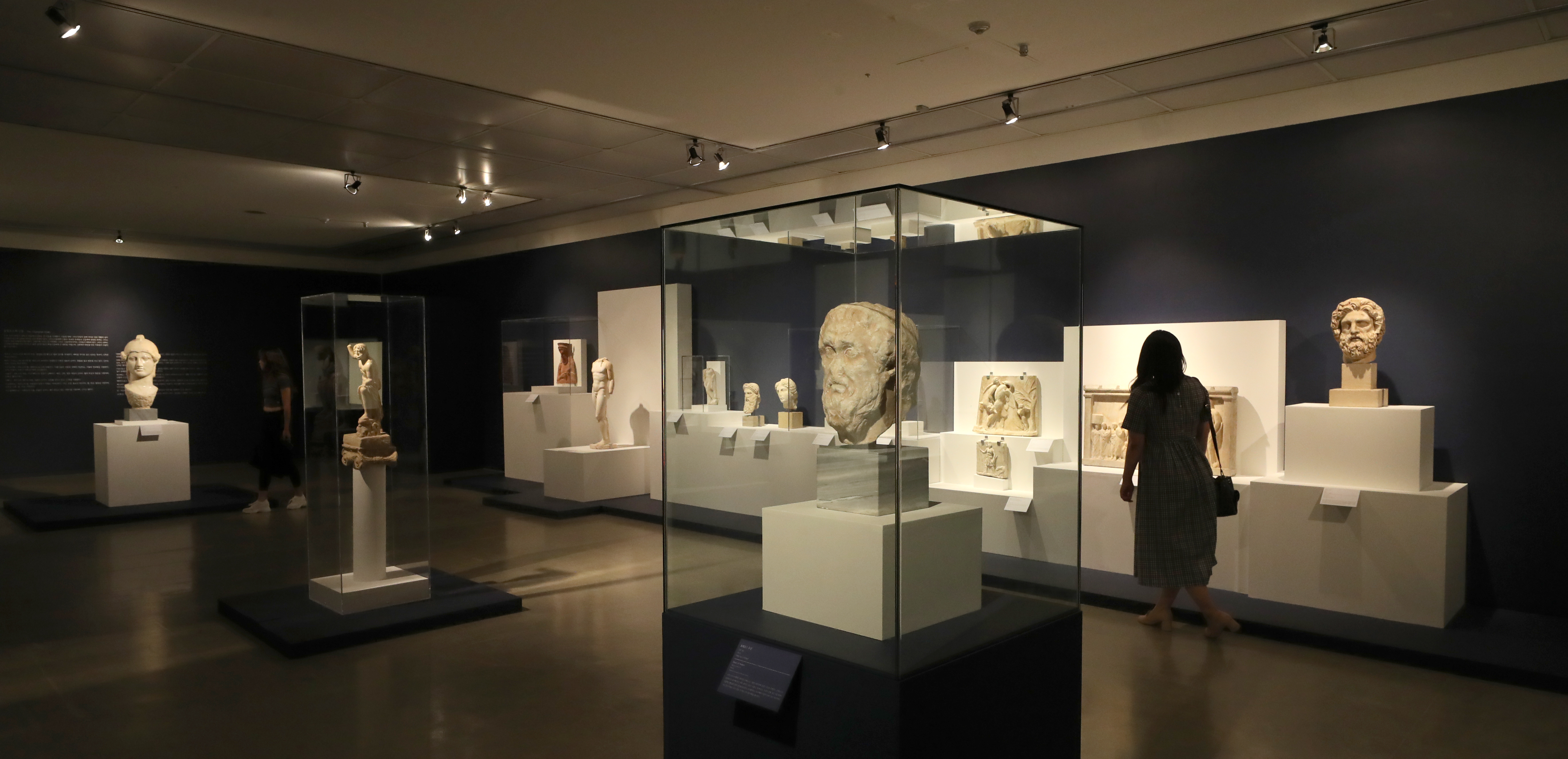 The Greeks Agamemnon to Alexander the Great June 04, 2019 Hangaram Art Museum, Seoul Arts Center Ministry of Culture, Sports and Tourism Korean Culture and Information Service ( Official Photographer : Kim Sunjoo This official Republic of Korea photograph is being made available only for publication by news organizations and/or for personal printing by the subject(s) of the photograph. The photograph may not be manipulated in any way. Also, it may not be used in any type of commercial, advertisement, product or promotion that in any way suggests approval or endorsement from the government of the Republic of Korea. 그리스 보물전 2019-06-04 예술의전당 한가람미술관 문화체육관광부 해외문화홍보원 코리아넷 김순주